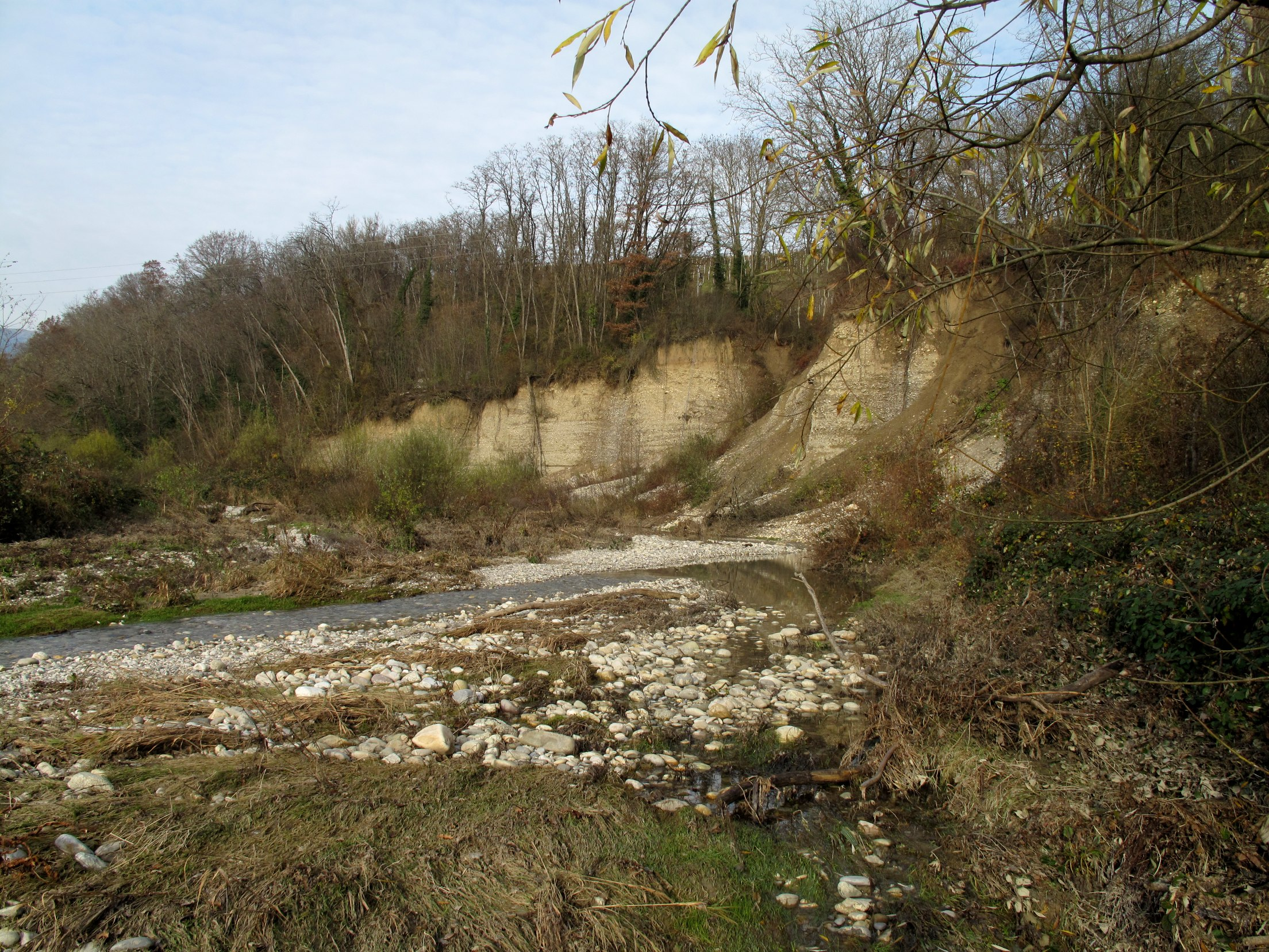 Randonnée le long de l'Allodon